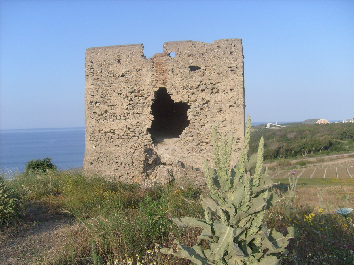 Autore: Marco Parrilla